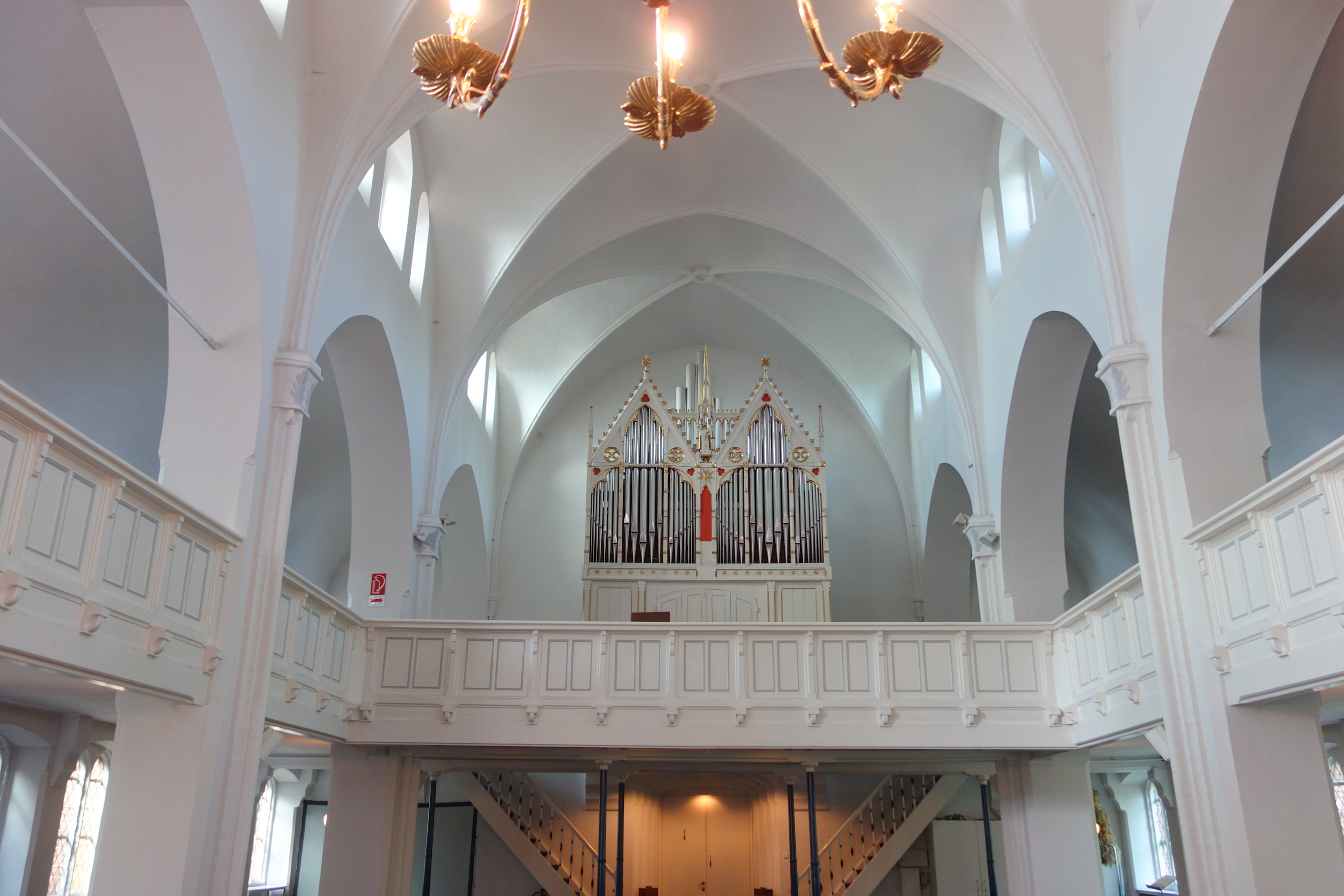 Orgel von St. Nikolai, Hamburg-Finkenwerder, Deutschland